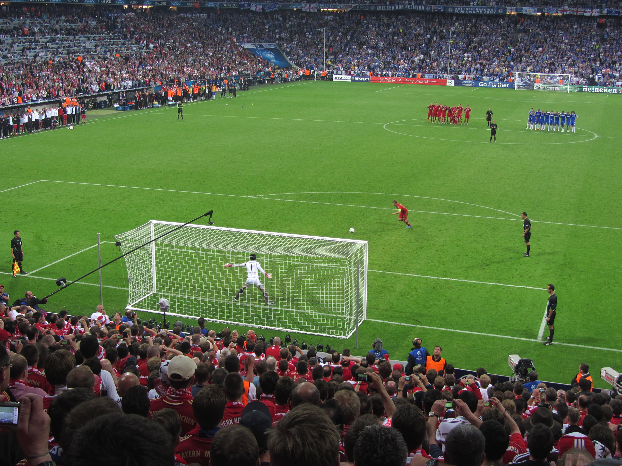 Bayern München - Chelsea FC 19.05.2012 Champions League Finale 2012 / "Finale Dahoam" Da lebte die Hoffnung noch - Lahm verwandelt den ersten Elfer Champions League Final 2012 First Bayern penalty by Lahm